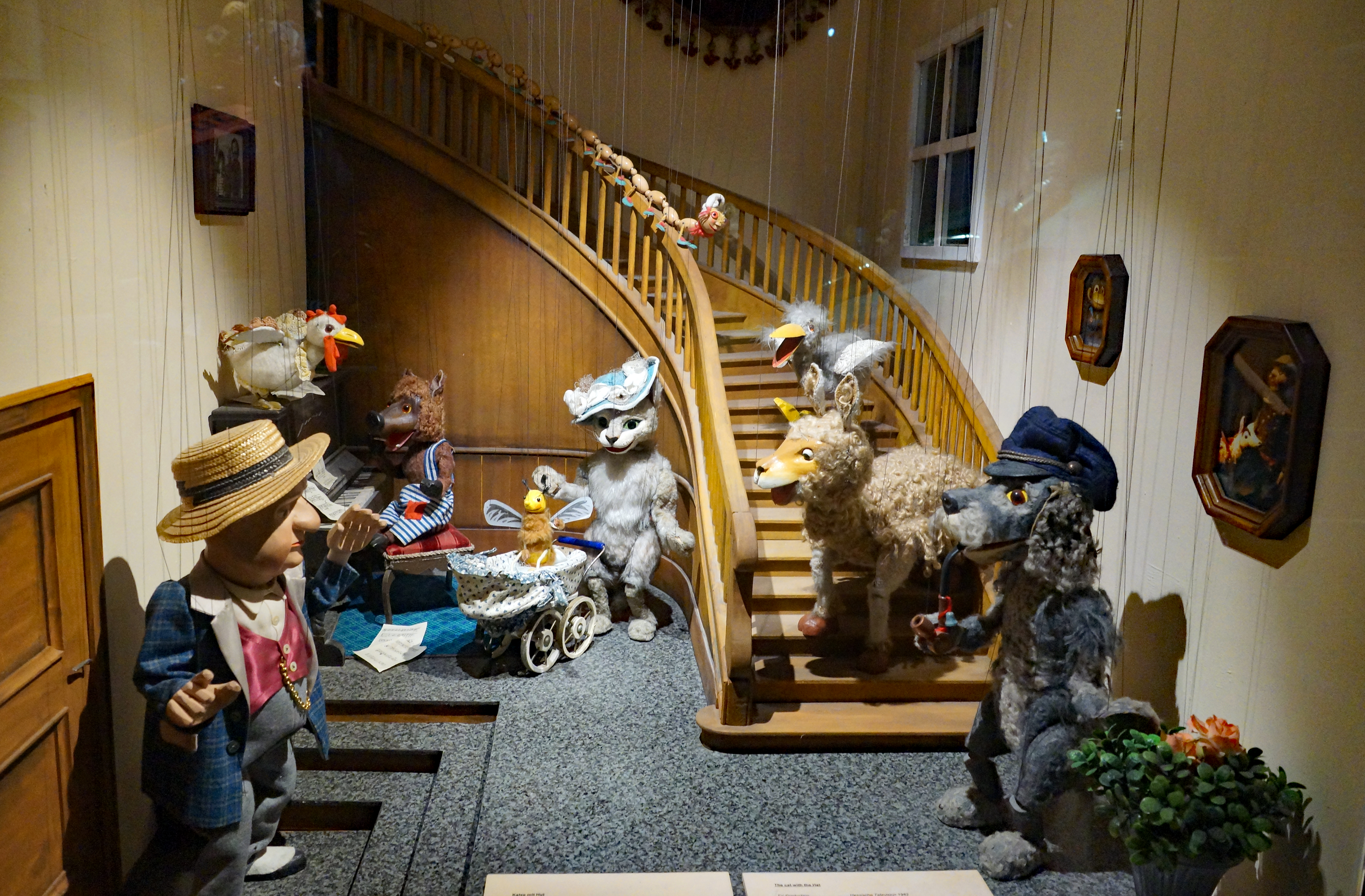 2019-01-27 Augsburg 031 Augsburger Puppenkiste